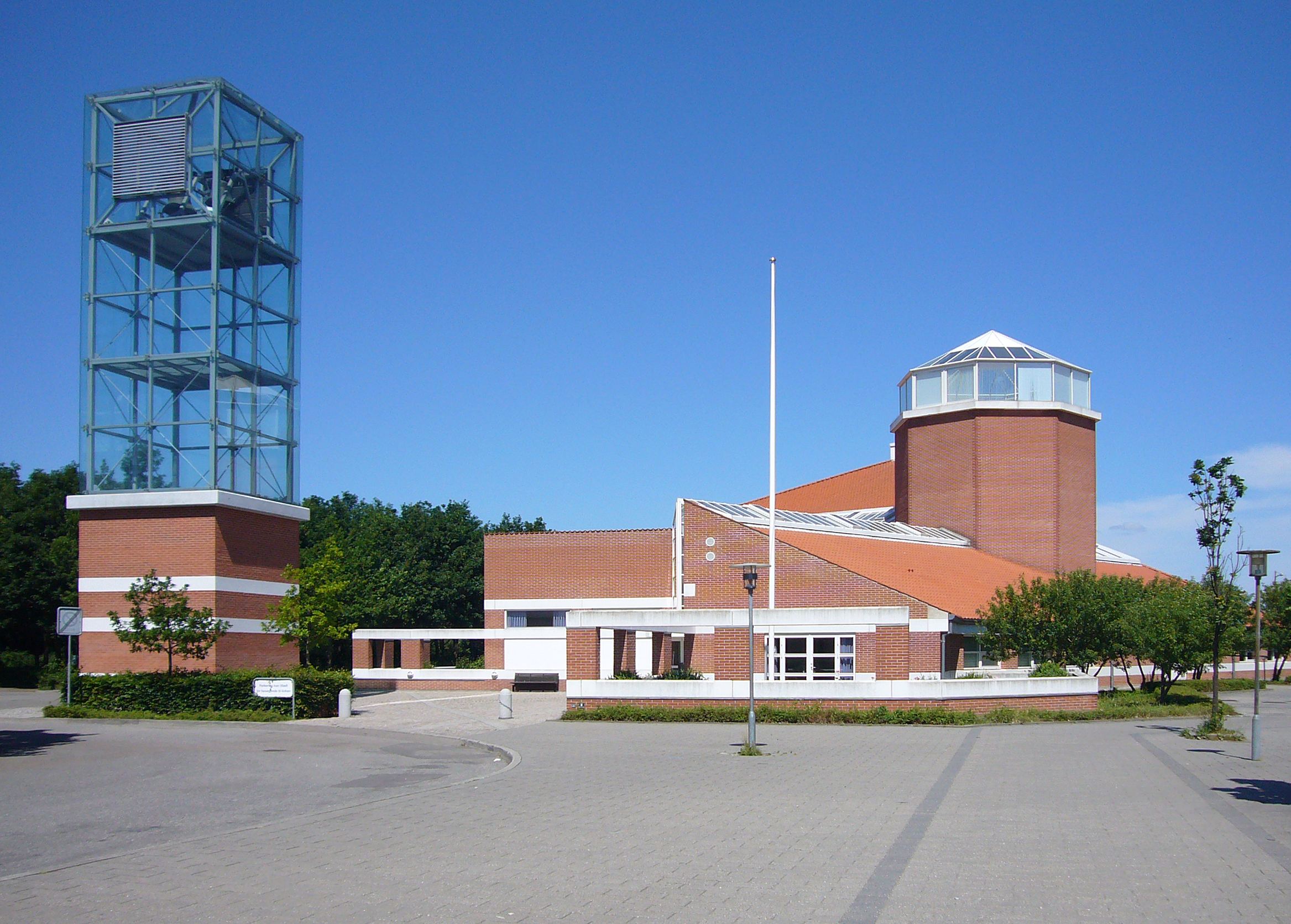 Johanneskirken, Greve Sogn, Roskilde County, Denmark.